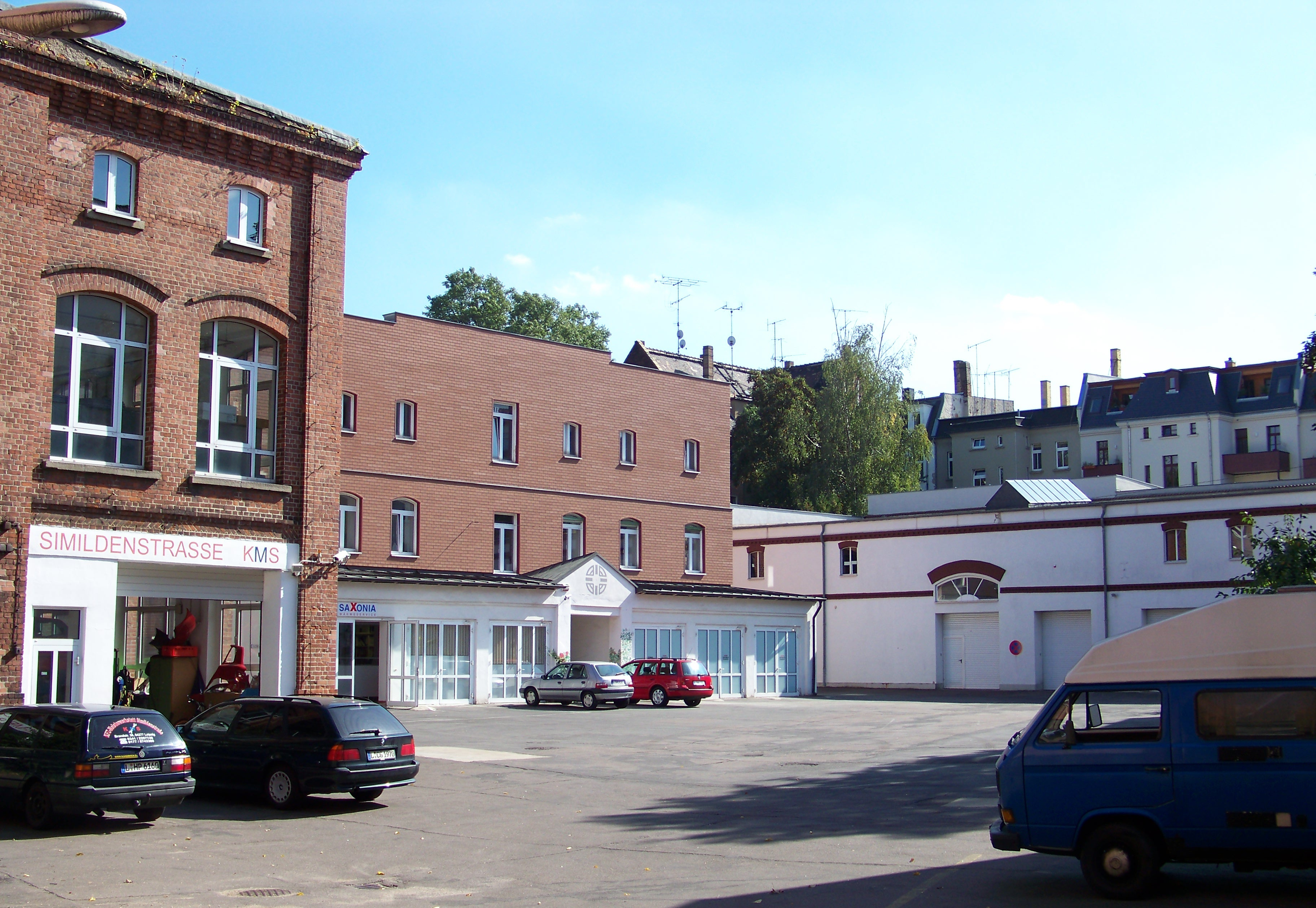 Ehemaliger zweistöckiger Straßenbahnhof Connewitz I (Brand-/Simildenstraße) in Leipzig